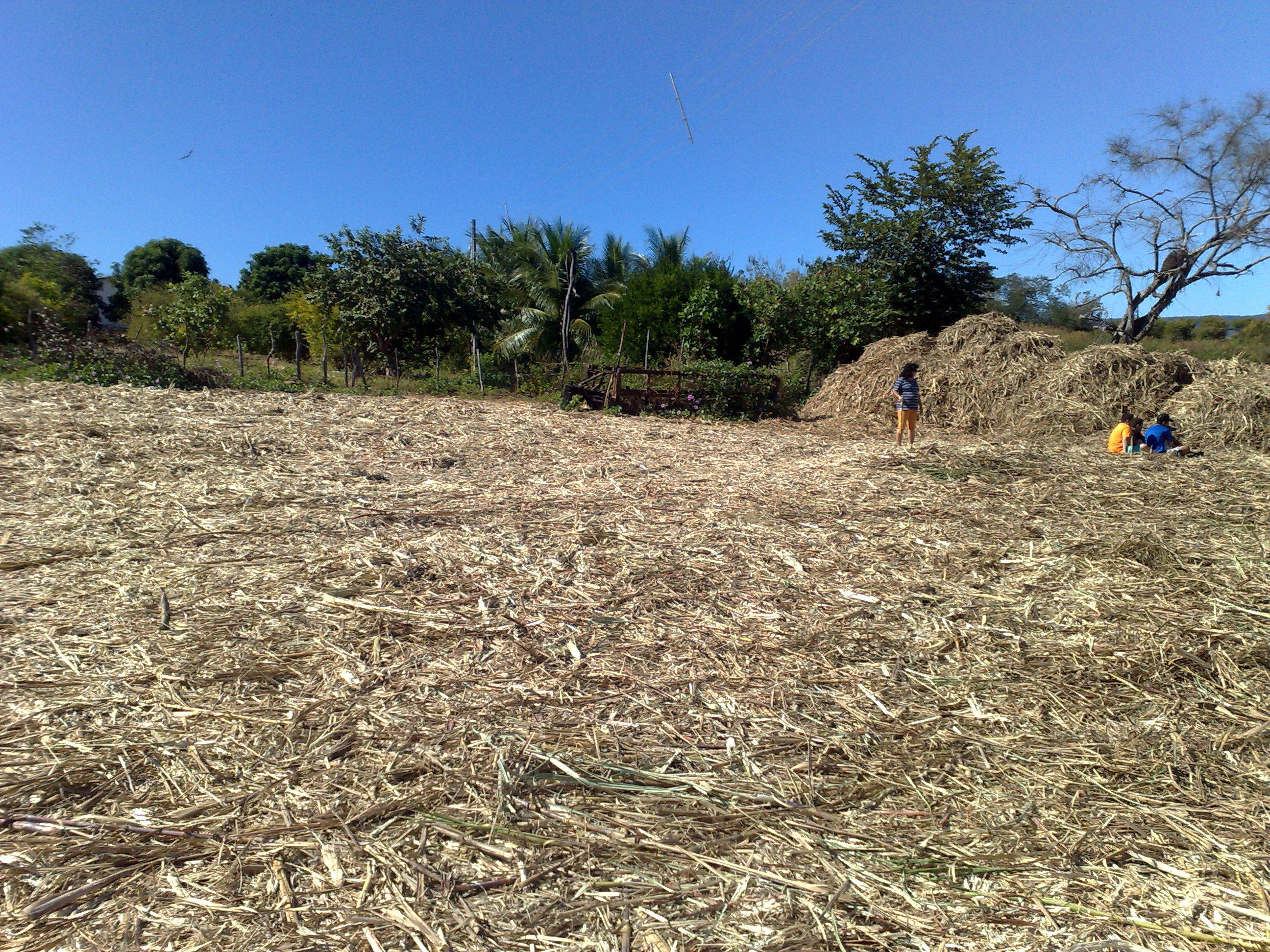 Engenho Zé Martins